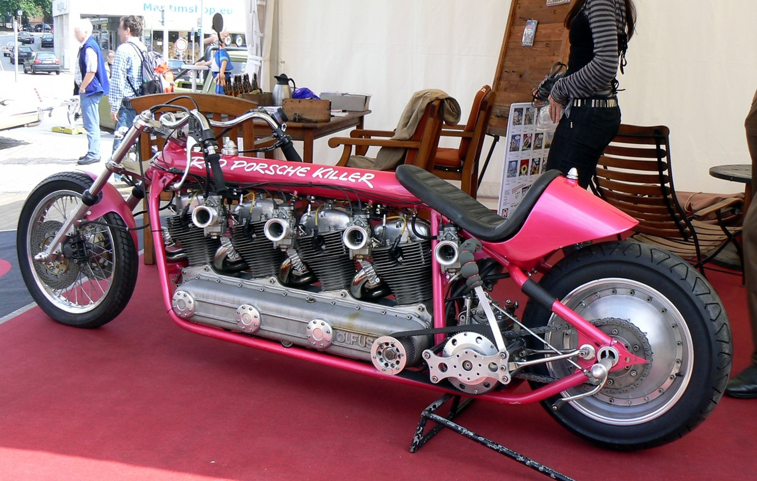 Motorrad Red Porsche Killer mit vier Horex-Motoren beim Harley Weekend Kiel 2007. Bekannt aus den Werner-Comics.